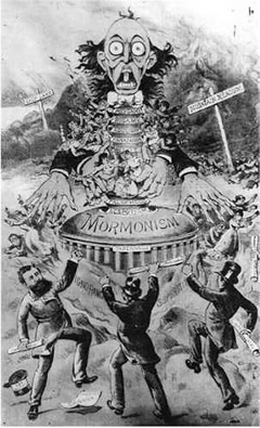 Anti-Mormon Cartoon